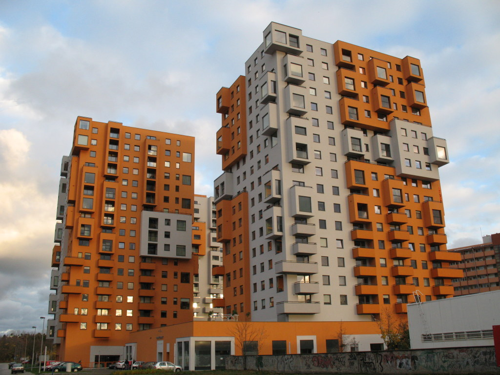 Gdańsk Przymorze (Poland). Modern blocks "Horyzont", Obrońców Wybrzeża Street.